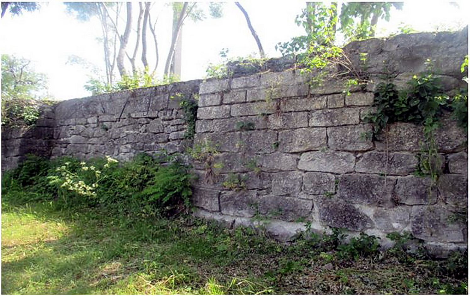 Fundaţia proiectatei Biserici Greco-Catolice în 1948 din centrul satului. Biserica nouă nu s-a realizat, cultul greco-catolic fiind desfiinţat în 1948.